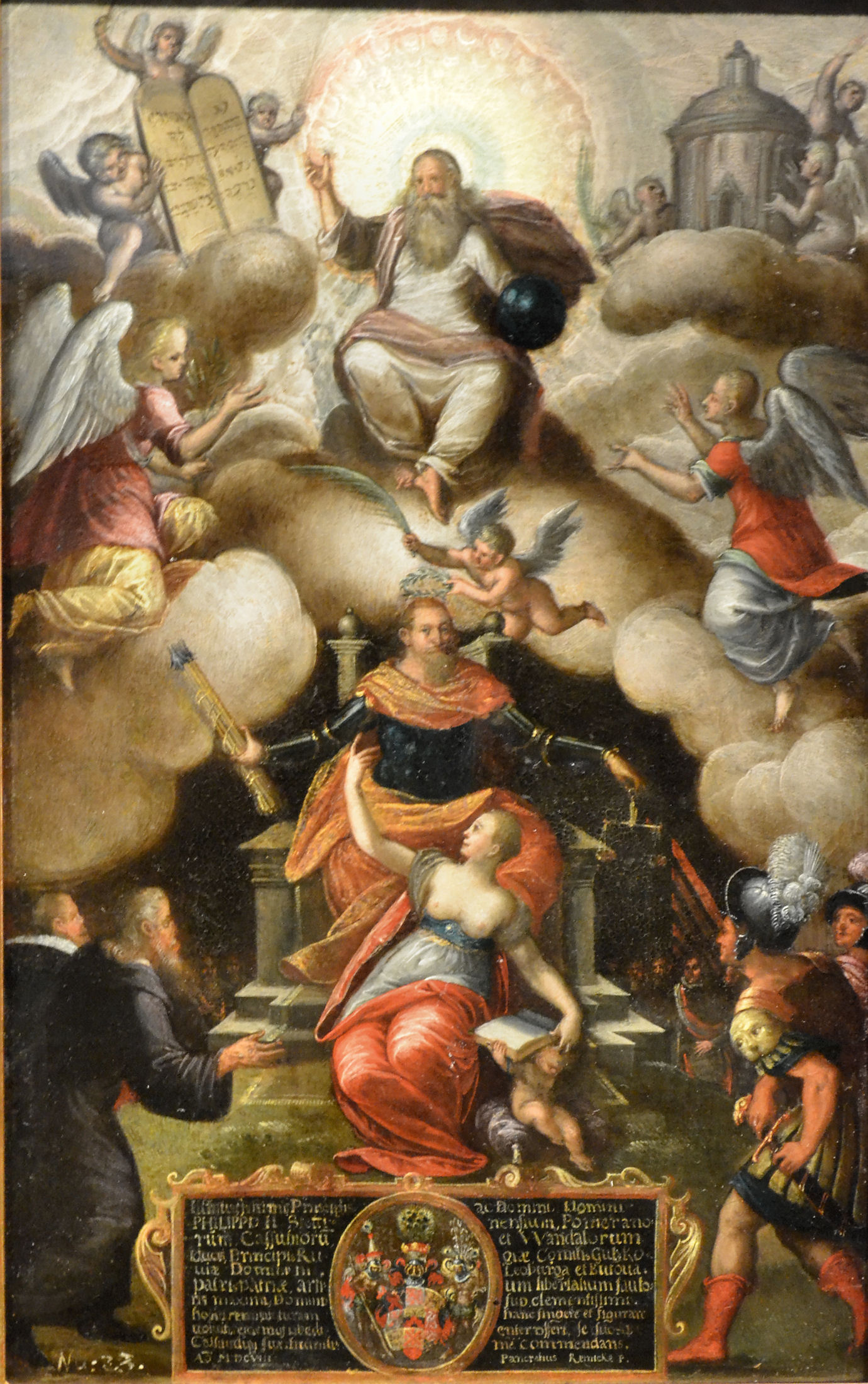 Apoteoza księcia pomorskiego Filipa II - eksponat Muzeum Narodowego w Szczecinie